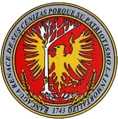 Escudo de la ciudad de Rancagua. Descripción: Escudo orlado con dos ramas de laurel y en su centro un fénix, renaciendo de sus cenizas y sosteniendo en su garra derecha el Árbol de la Libertad. El campo del escudo será rojo y el lema que circuirá el fénix será el siguiente: "Rancagua renace de sus cenizas, porque su patriotismo la inmortalizó".